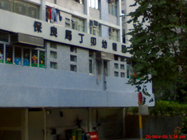 中文（香港）: 新界大窩口一間幼稚園(保良局丁卯幼稚園)